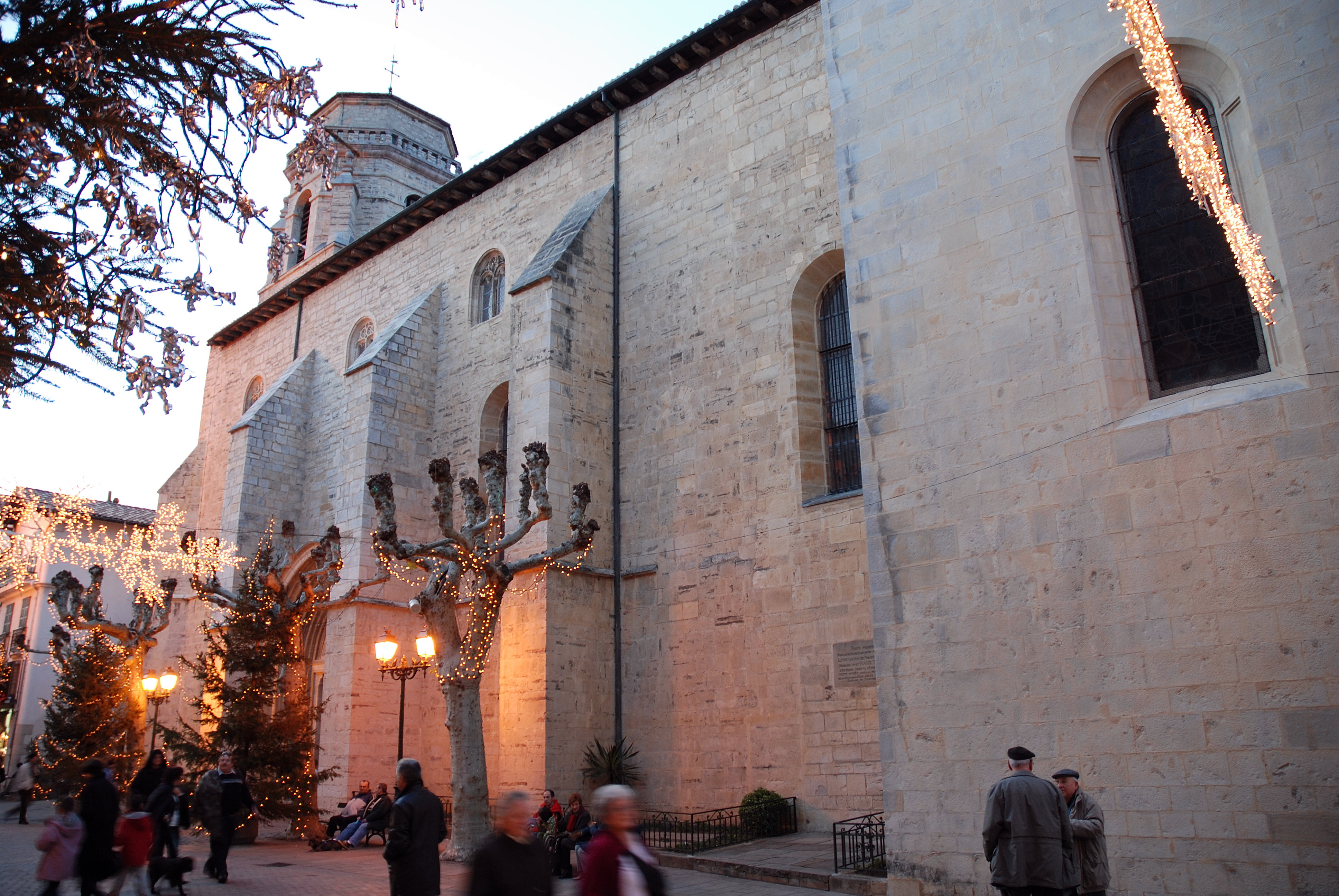 Saint-Jean-de-Luz, l'église Saint-Jean-Baptiste. Photo prise le 03/01/07 par Harrieta171